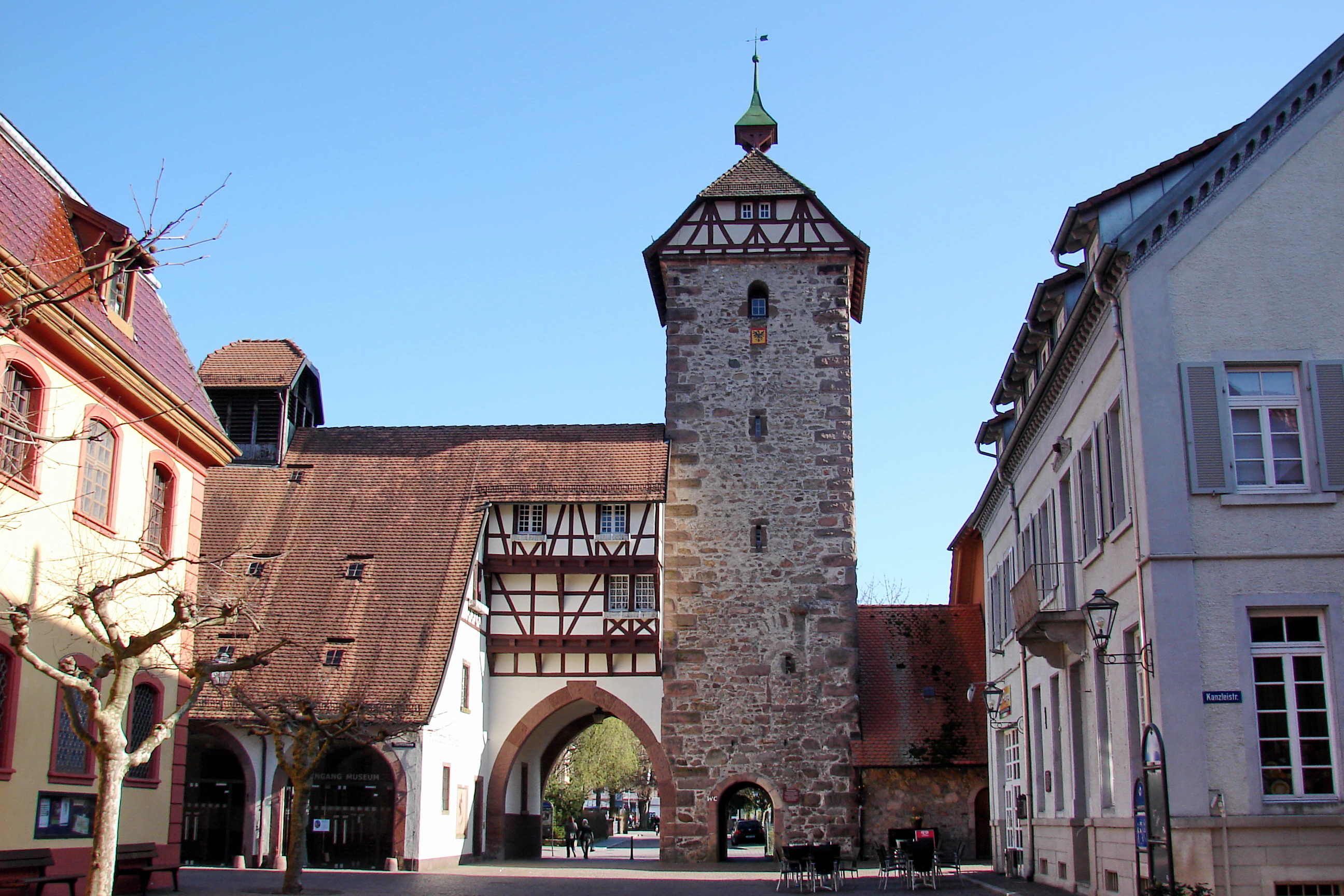 Storchenturm in Zell am Harmersbach